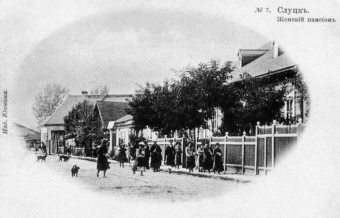 Беларуская (тарашкевіца): Слуцак (Słucak), вуліца Віленская (vulica Vilenskaja). Жаночы пансіён